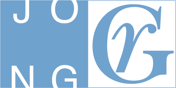 beeldmerk jonge Gezondheidsraad